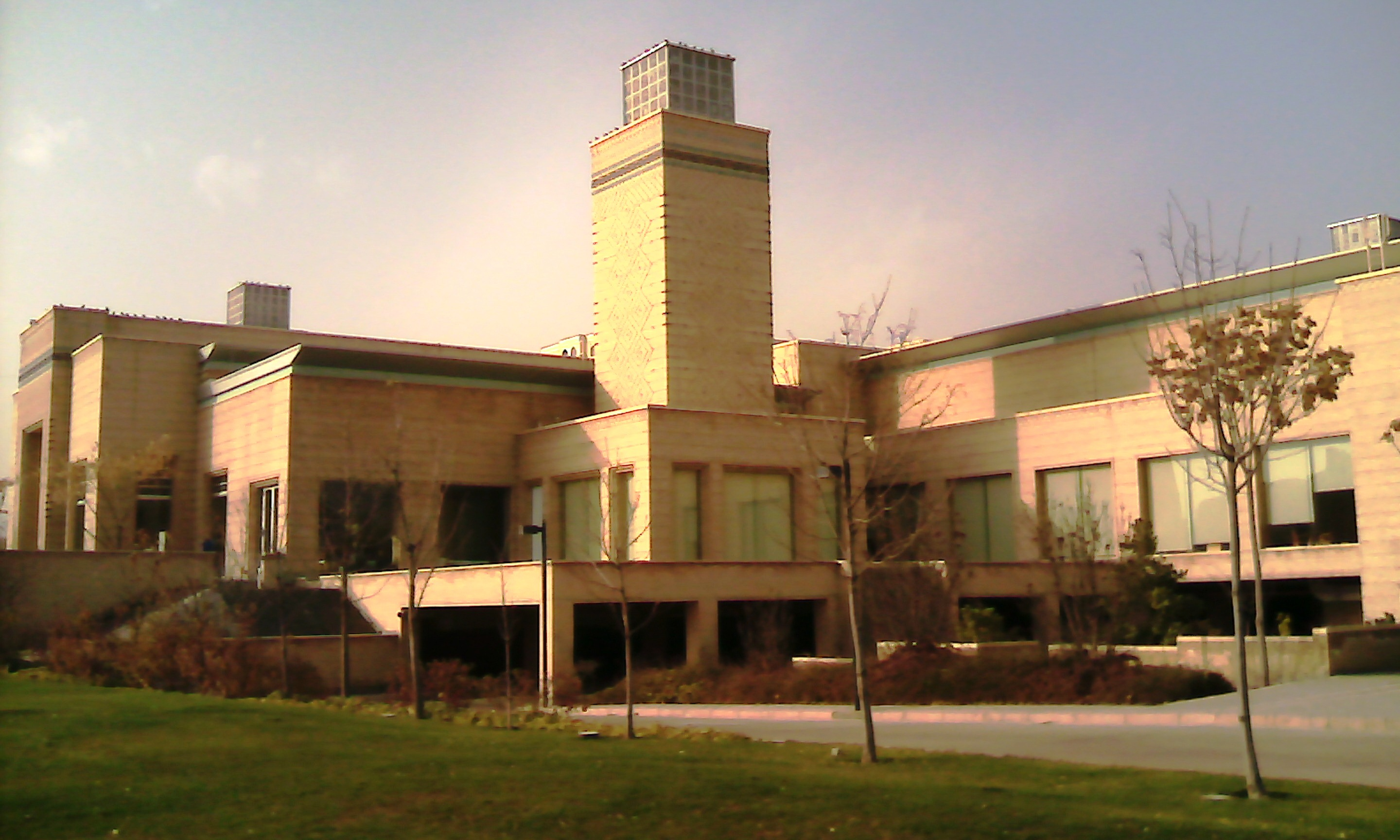 Культурный центр исмаилитов в г. Душанбе, здание построено в 2009 году. Активная фаза строительства объекта началось в сентябре 2005 года. На строительство центра Фондом Ага Хана было выделено порядка $16 млн. (Здание)